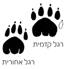 עקבותיו של הזאב הטסמני